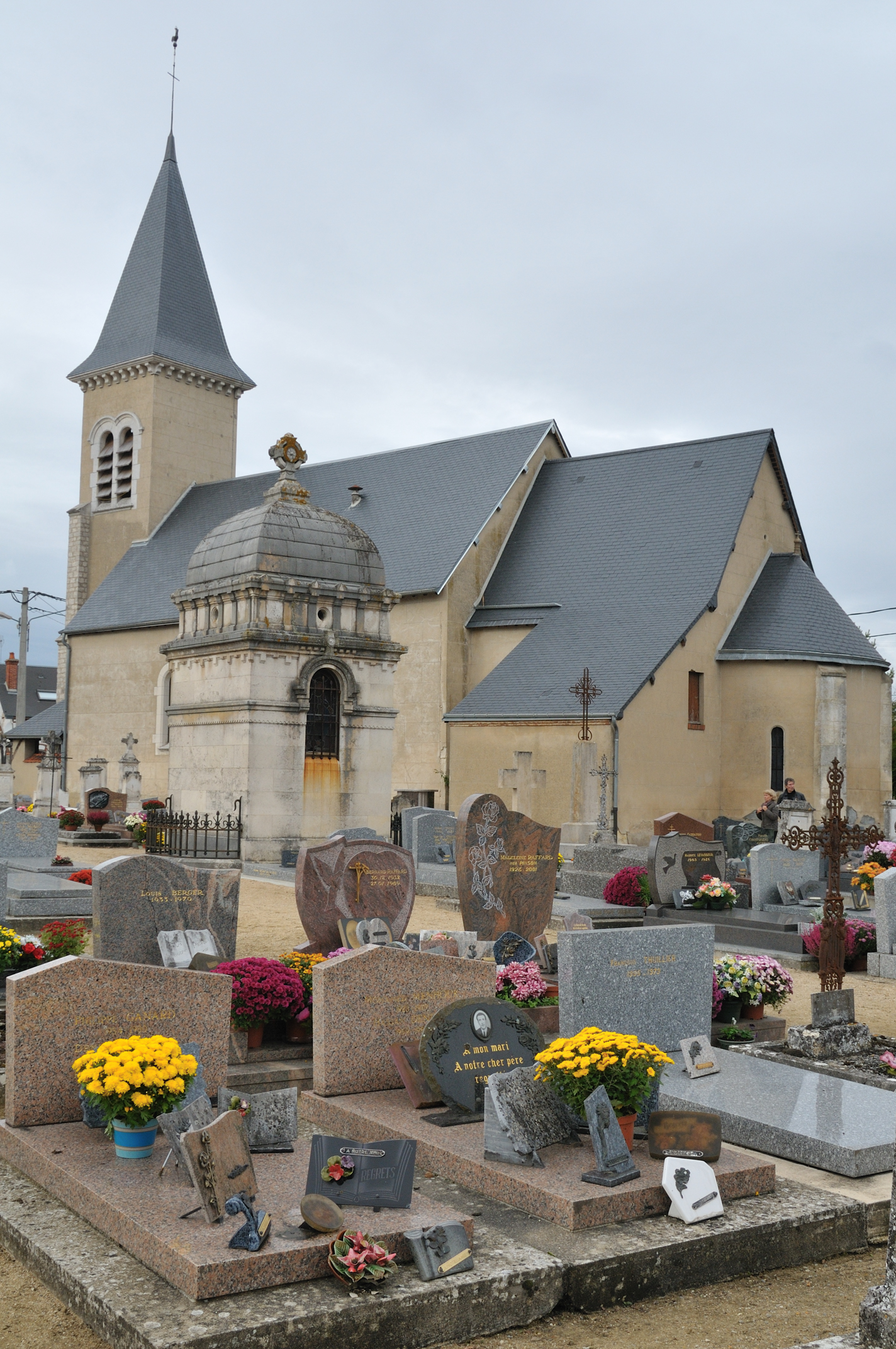 Cimetière et église Saint-Germain de Thimory, Loiret, France